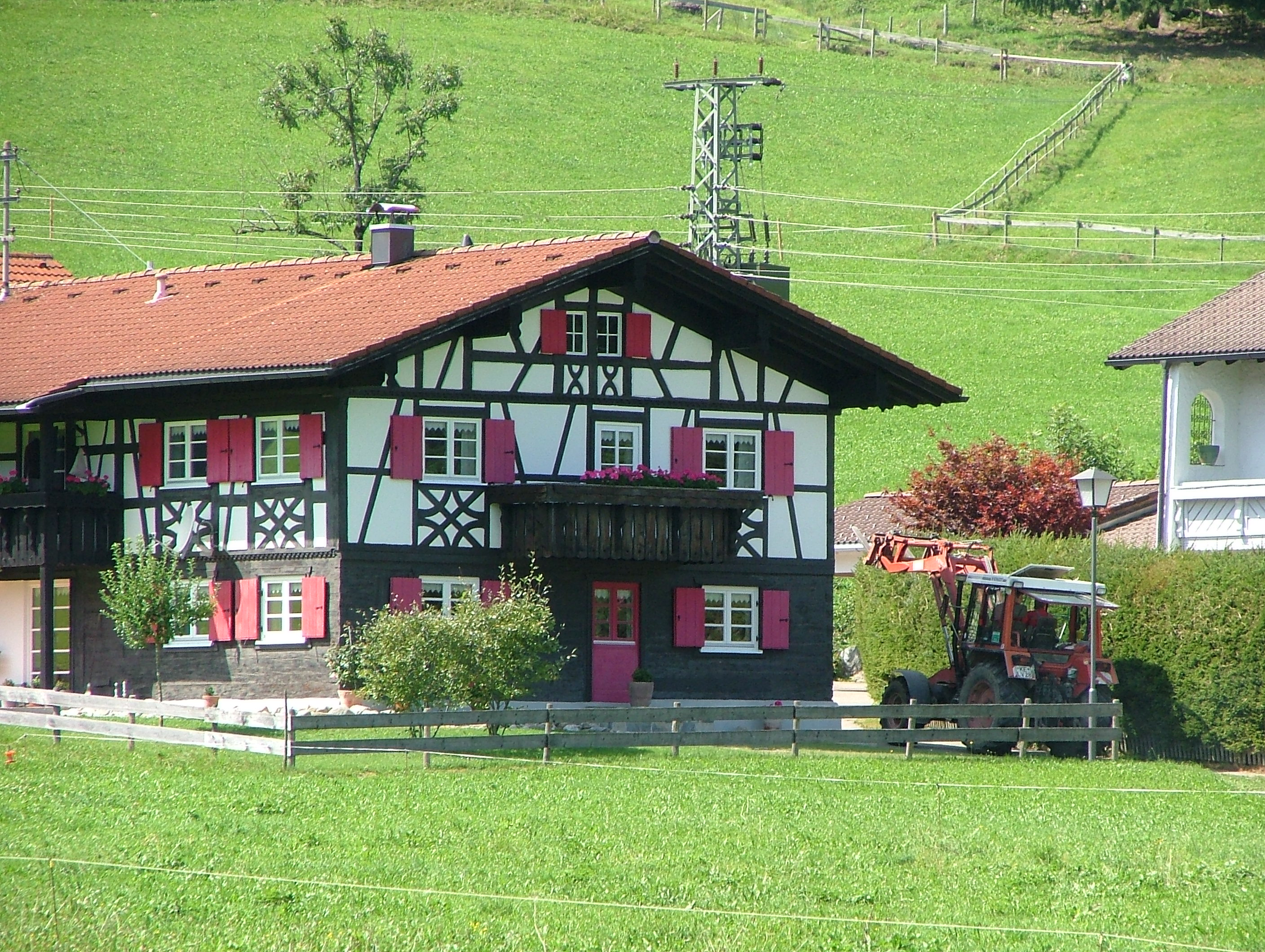 Kalvarienbergstraße